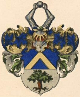 Ekesparre suguvõsa aadlivapp